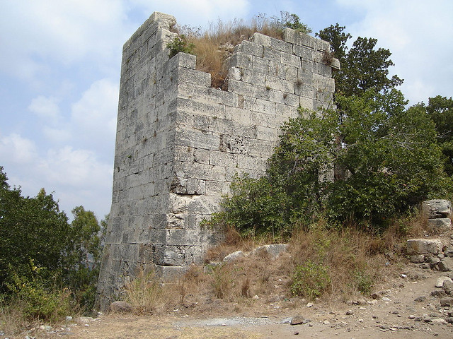 أطلال قلعة العريمة الواقعة في سهل عكار في الجنوب الشرقي من طرطوس في سوريا، تعود إلى عهد قديم ولم يحدد تاريخ إنشائها بعد، غير أن أول ذكر لها في المصادر التاريخية يعود إلى انتقال ملكيتها من ملاكها الطرابلسيين إلى الكونت برتران دوتولوز وذلك عندما قدم فرسان الاسبتارية إلى طرابلس عام 1142م.